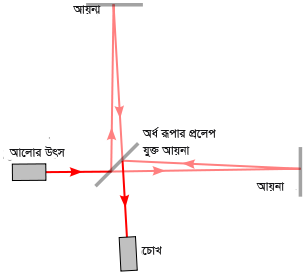 edited by me